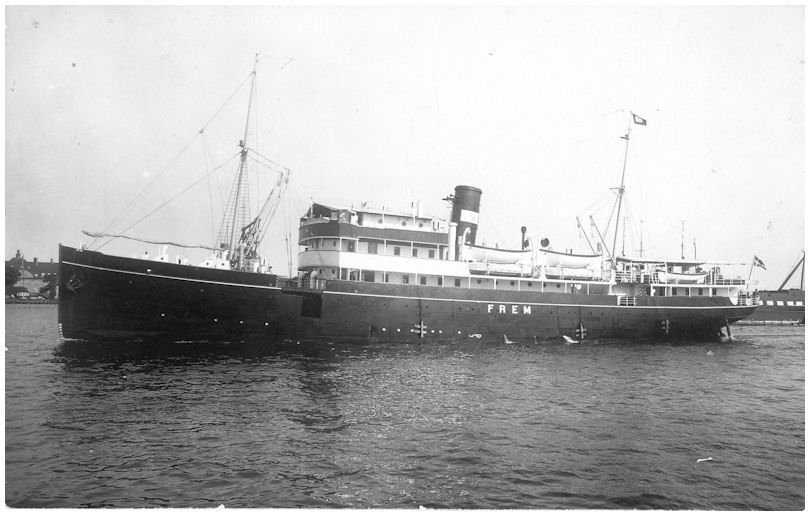 MS Frem 1924 - NFKJ - IMO:5021463